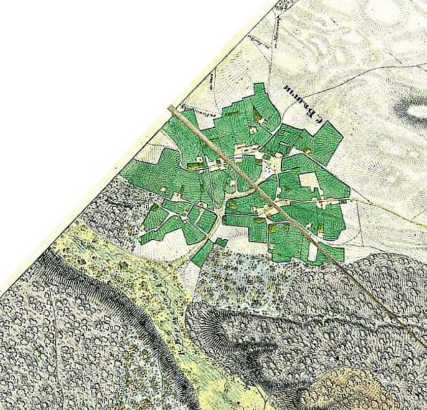 Похідна робота від File:Kyiv map 1842-oriented-to-north.jpg